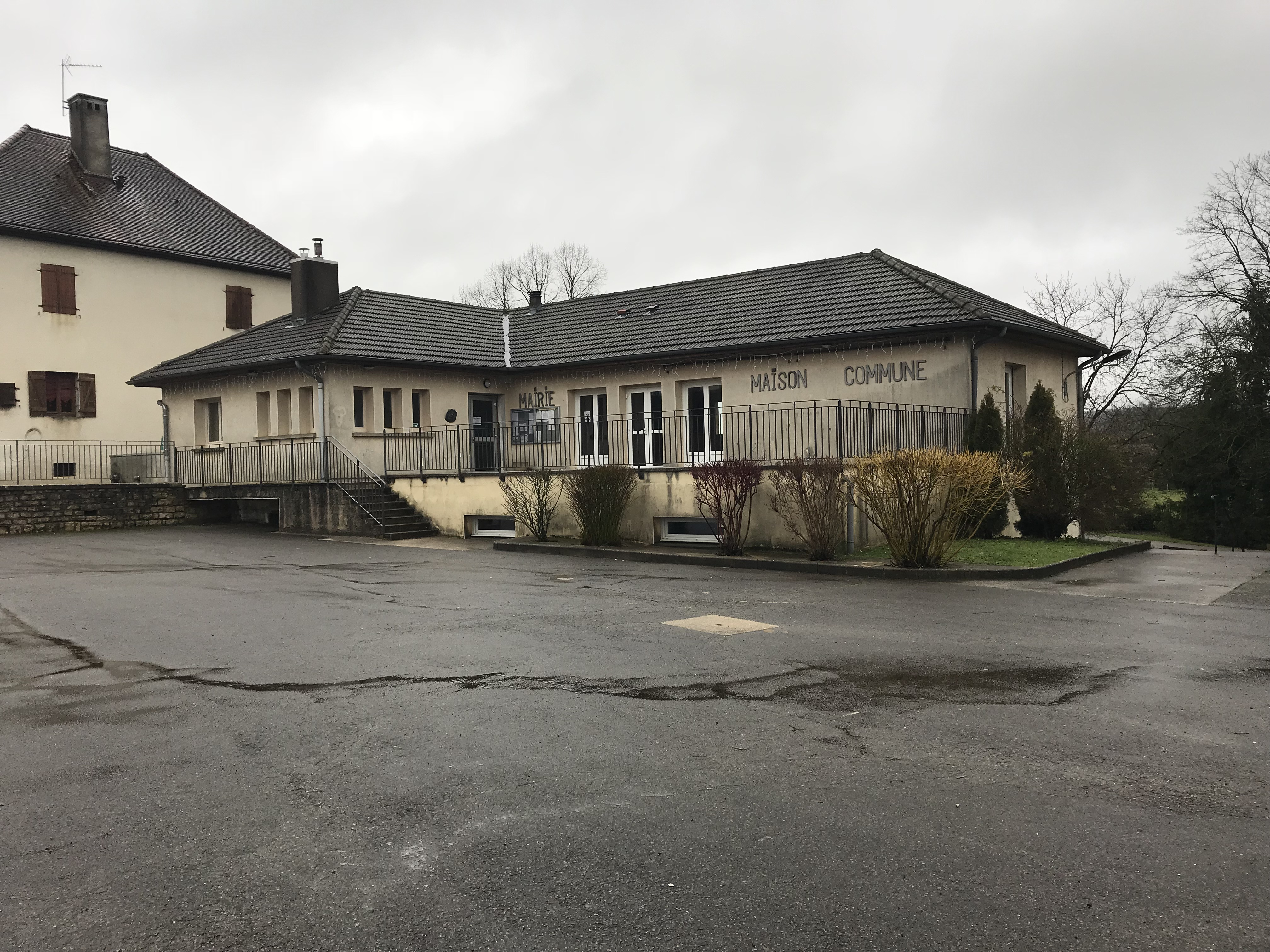 Sermange (Jura, France) en janvier 2018.